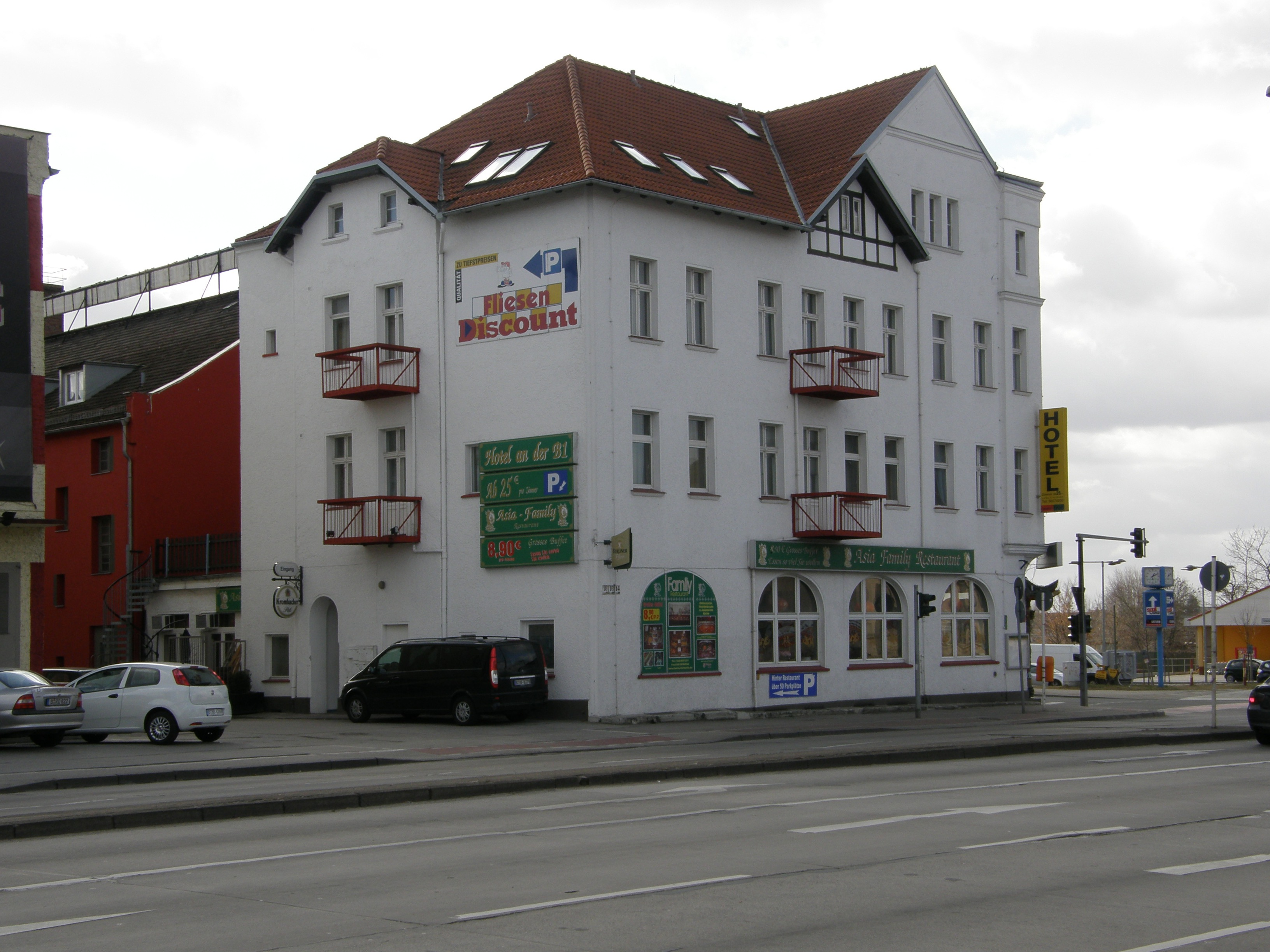 Berlin-Kaulsdorf, Alt-Kaulsdorf Ecke Chemnitzer Straße